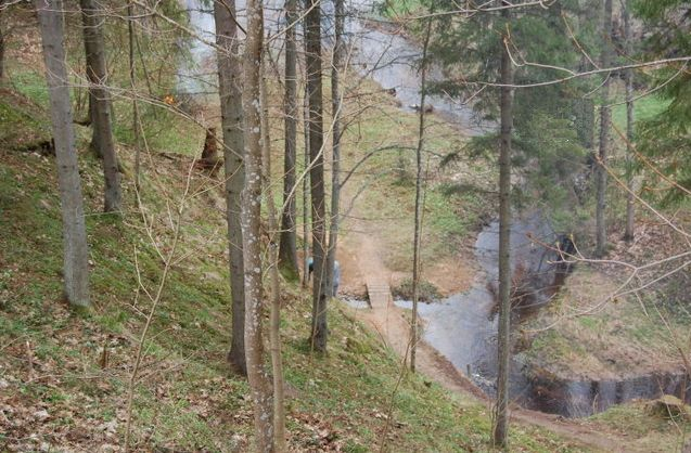 Pokardi ürgorg selle põhjas voolava Pokardi ojaga. Pilt on tehtud ürituse "Teeme ära" ajal.